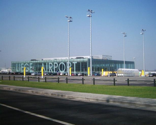 Liège Airport (de, en, fr, nl, pl)